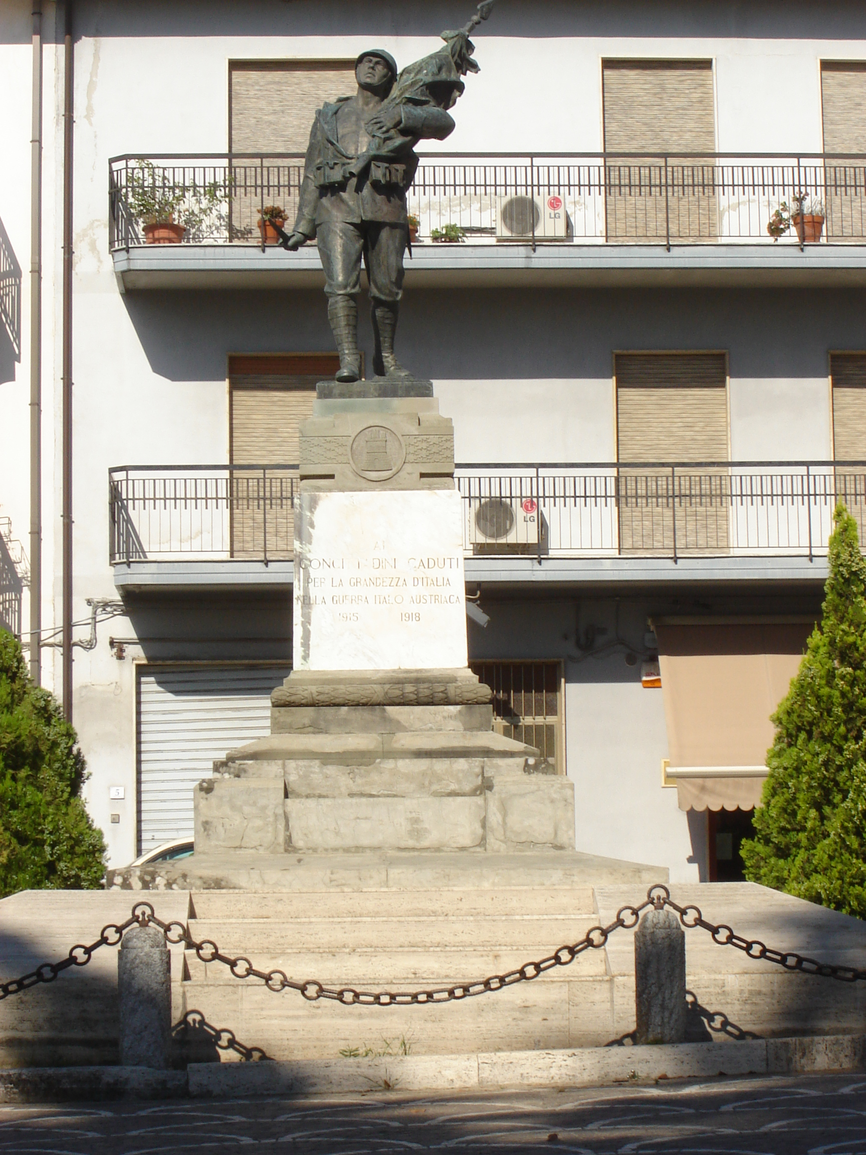 Opera bronzea di Concesso Barca. Soldato italiano col pugio nella mano destra ed il drappo patriottico in braccio sinistro.